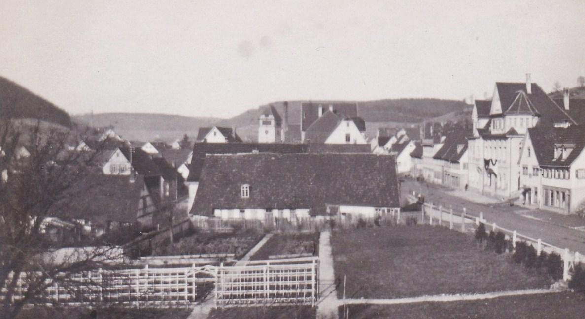 In 1910 Johannes Hakenmüller, textile-manufacturer and -Pioneer in the today 72461 Albstadt-Tailfingen on the 900 metres high Suebian Alb in Southwestern-Germany had bought one after another and made break down six old lodging-houses for later enlarging his upcoming, in 1887 founded enterprise. Meanwhile he installed a fine garden, in which all above he was planting and culturing his favourite plants: roses. Um das Jahr 1910 hatte Johannes Hakenmüller, Textil-Unternehmer und -Pionier im heutigen 72461 Albstadt-Tailfingen auf 900 Metern der Schwäbischen Alb in Südwestdeutschland gelegen nach und nach sechs seiner Fabrikgebäude angrenzende Wohnhäuser entlang der Hechinger- und Kronenstraße aufgekauft und abreissen lassen, um bei Bedarf darauf später sein aufstrebendes Unternehmen baulich zu vergrößern. Zwischenzeitlich legte er darauf einen ansehlichen Garten an, auf welchem er vor allem seine Lieblingsblume pflanzte und kultivierte: Rosen.